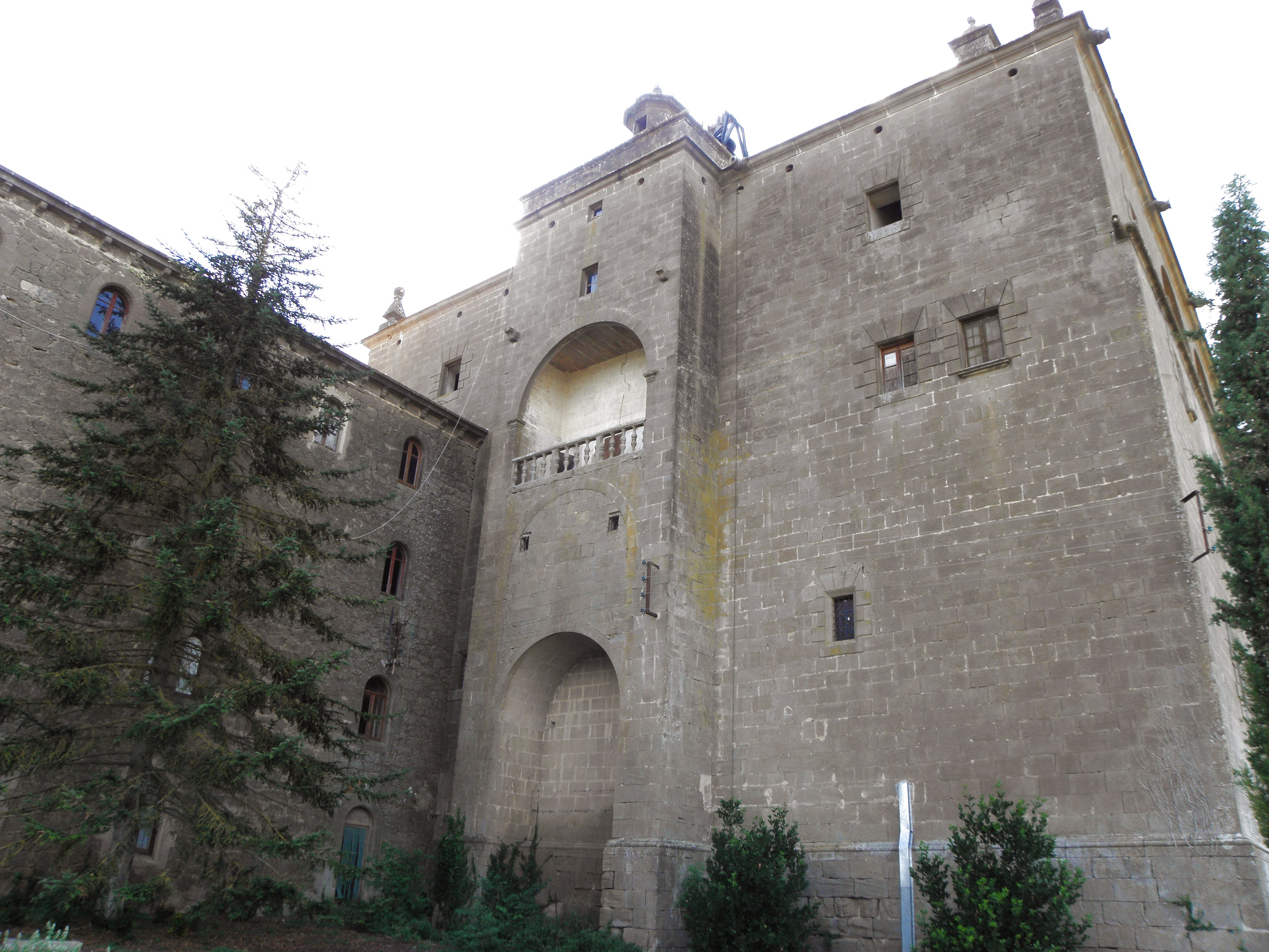 La façana de llevant de l'església del Santuari del Miracle (Riner, Solsonès)